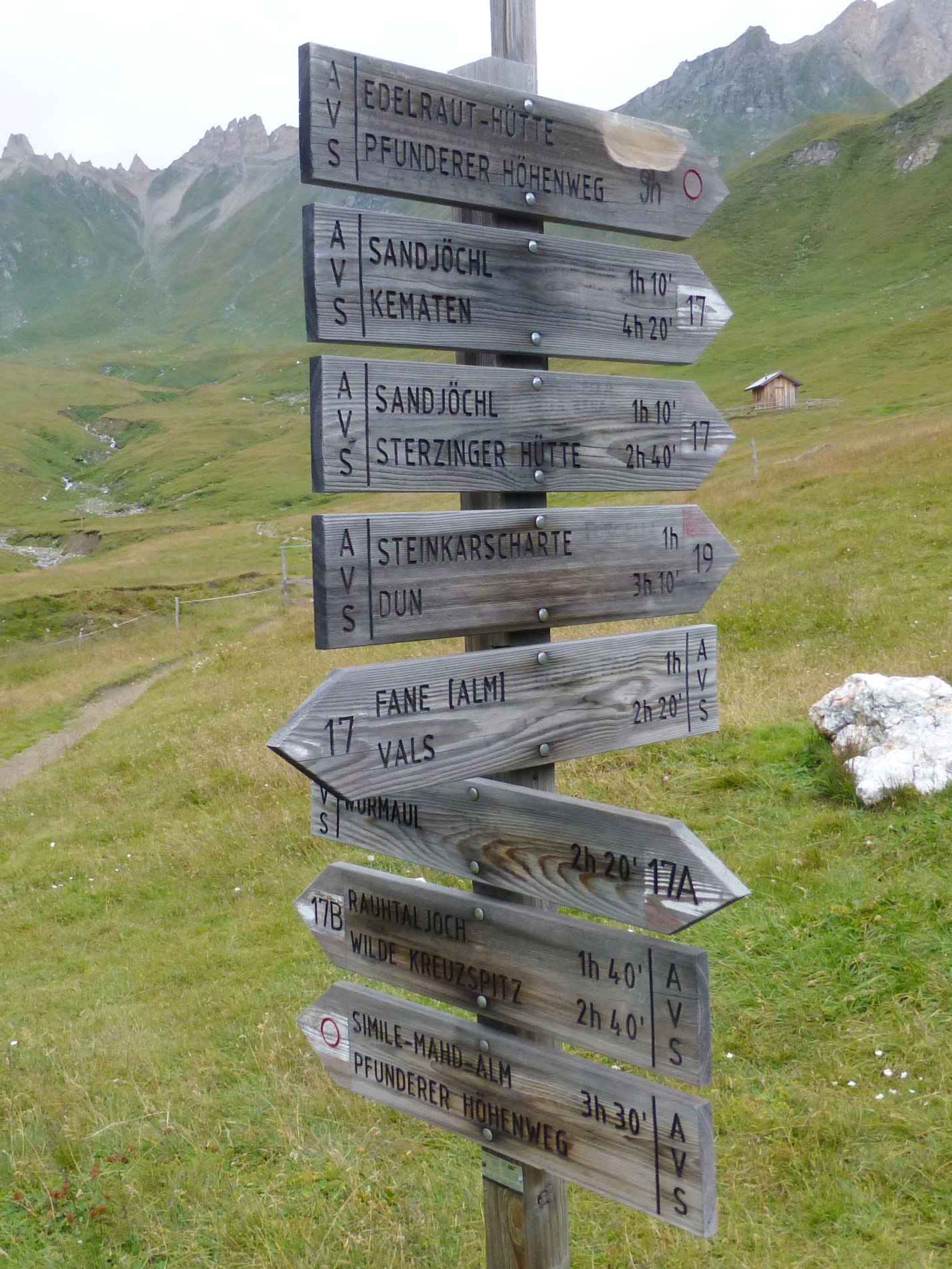 Wegweiser an der Brixner Hütte Südtirol